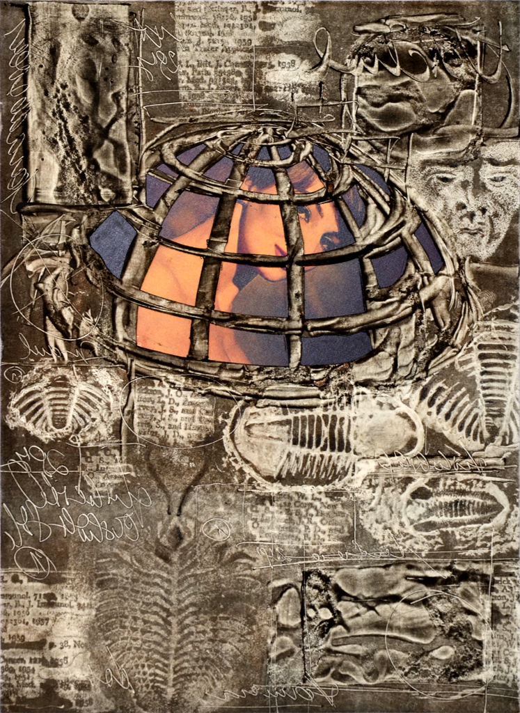 Oldřich Hamera, Madona, aktivní lept, koláž, 27x19 cm, 2002